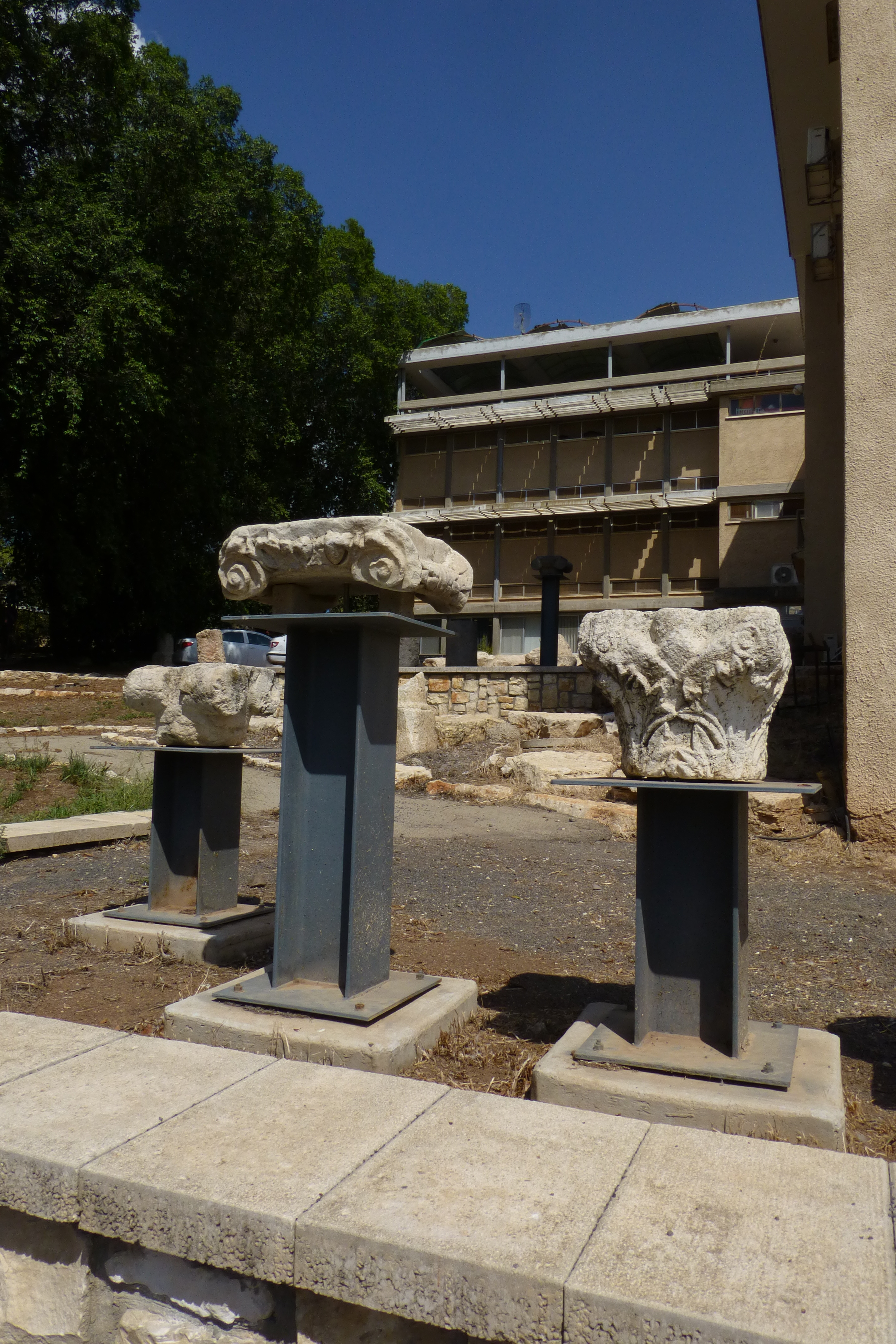 מוזיאון בית שטורמן המצוי בקיבוץ עין חרוד מאוחד נוסד בשנת 1941 על ידי חבר הקיבוץ שמואל סבוראי כמוזיאון לטבע.